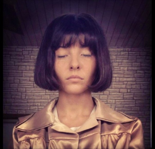 Портрет Натальи в сериале Вангелия